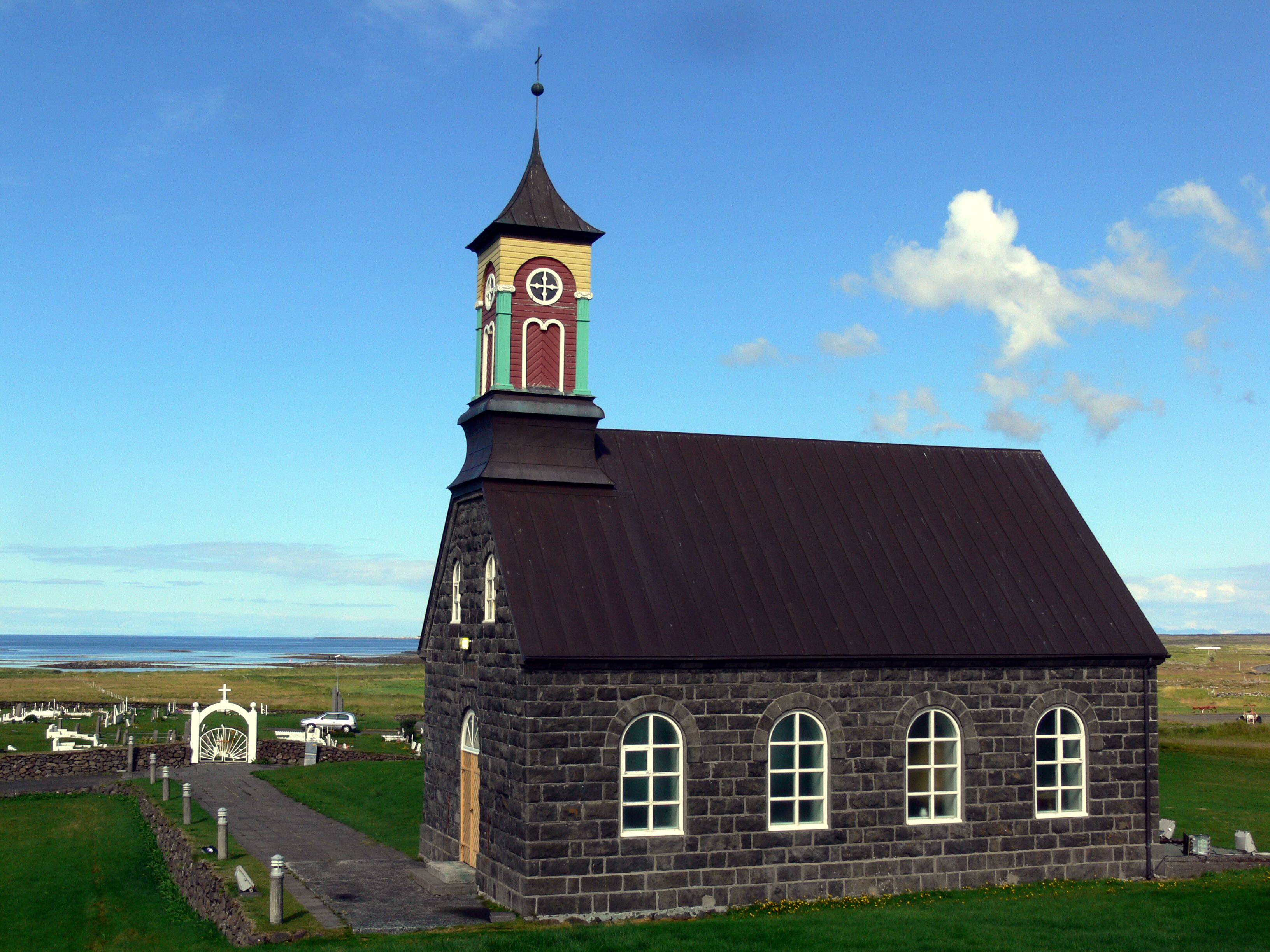 Kirche in Hvalsnes auf Reykjanes in Südisland